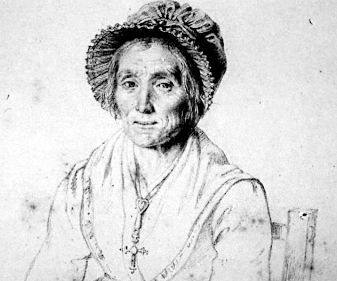 Portrait de Marie Paradis (1778-1839), vers 1830, gravure origine inconnue.